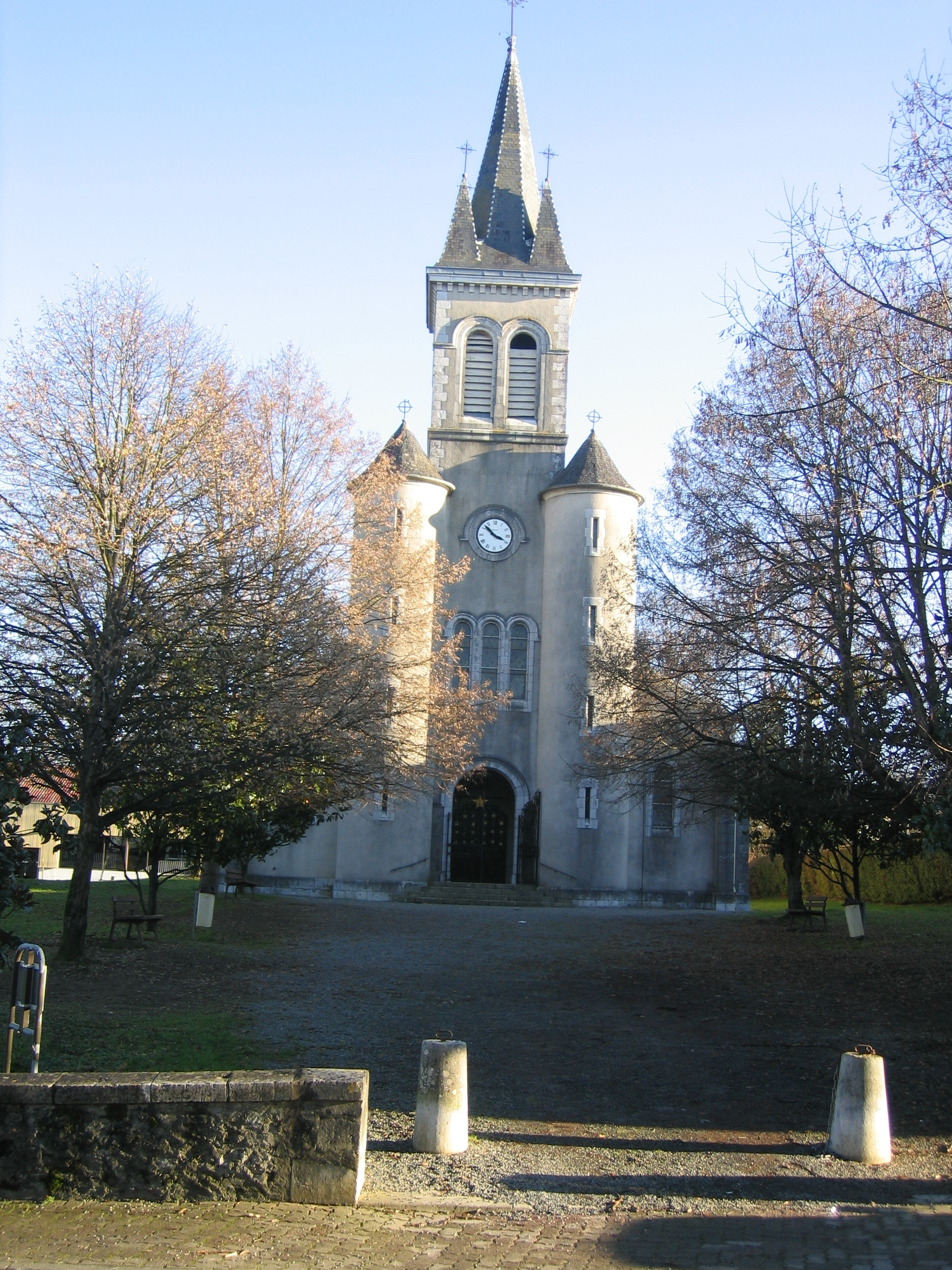 Orthez (France) : passé le Gave, s'étend le quartier Départ et se dresse son église.